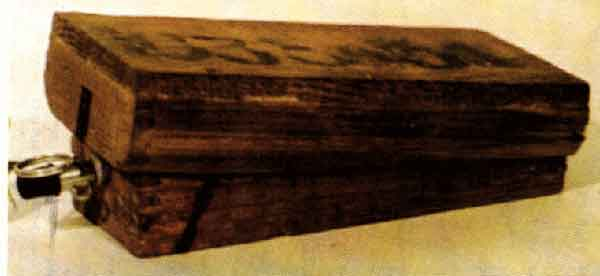 Sowiecka mina przeciwpiechotna PMD-6